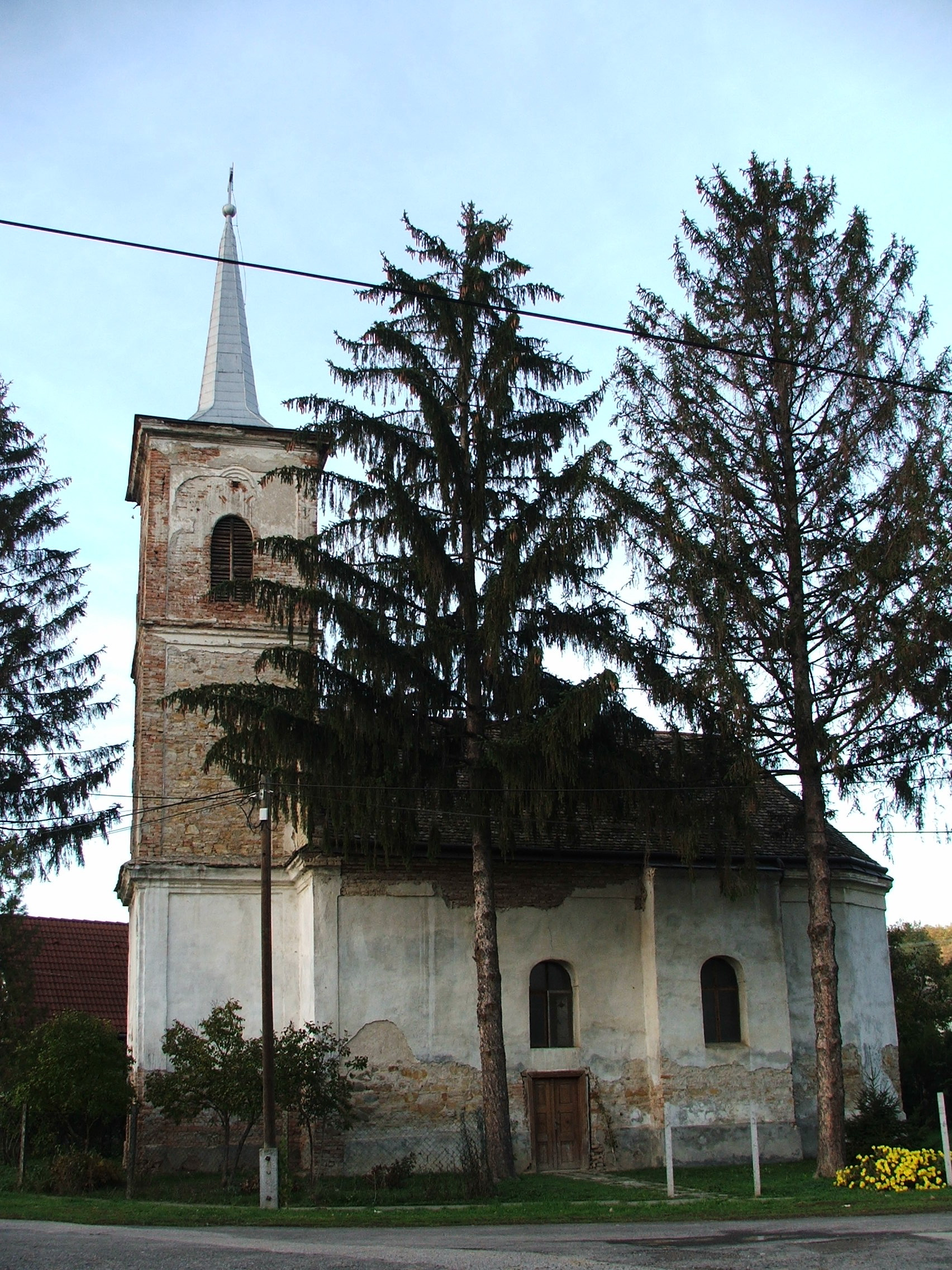 R. k. templom (Nepomuki Szent János, volt görög keleti szerb templom), Dózsa György u. (, )